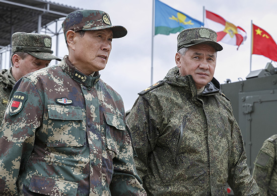 Министры обороны России и Китая проверили работу пунктов управления войсками на манёврах «Восток-2018»